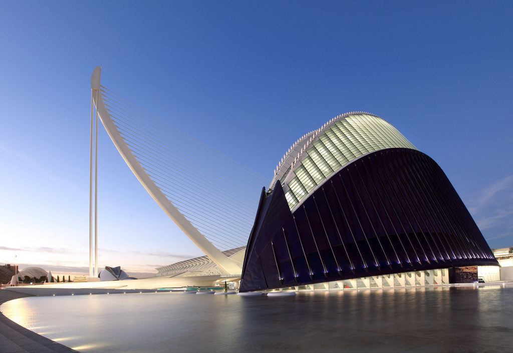 Ciudad de las Artes y las Ciencias. Valencia